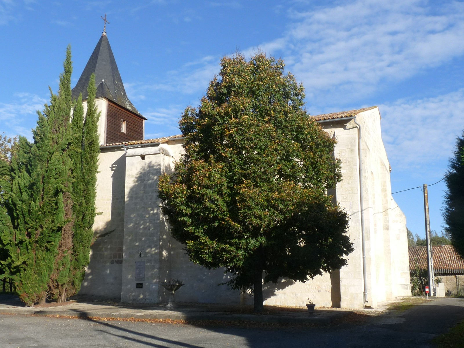 Eglise de Bran, Charente-Maritime, France